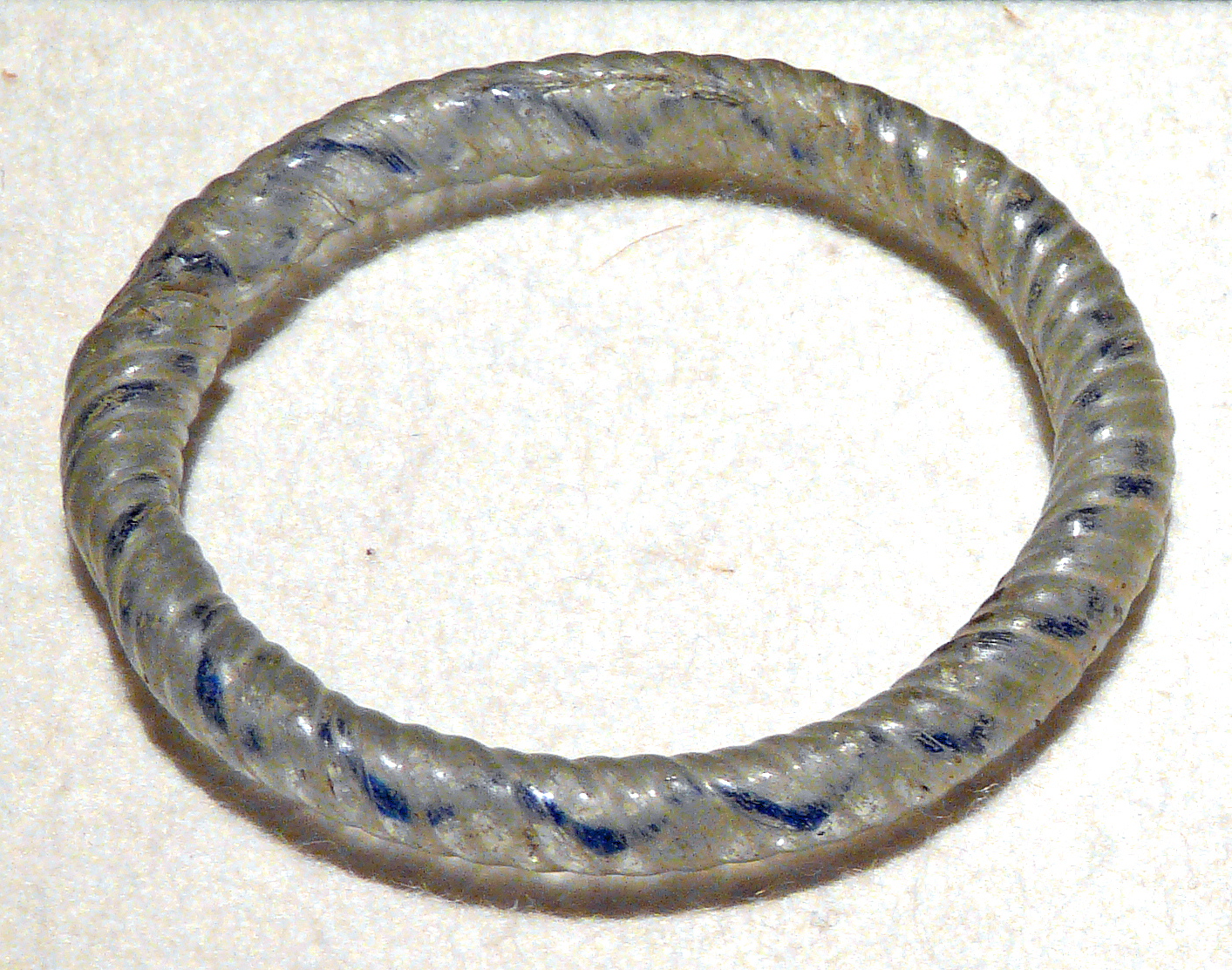 Armreif aus farblosem Glas mit kobaltblauer Fadeneinlage, 2./3. Jh., aus Novaesium, Clemens-Sels-Museum, Neuss